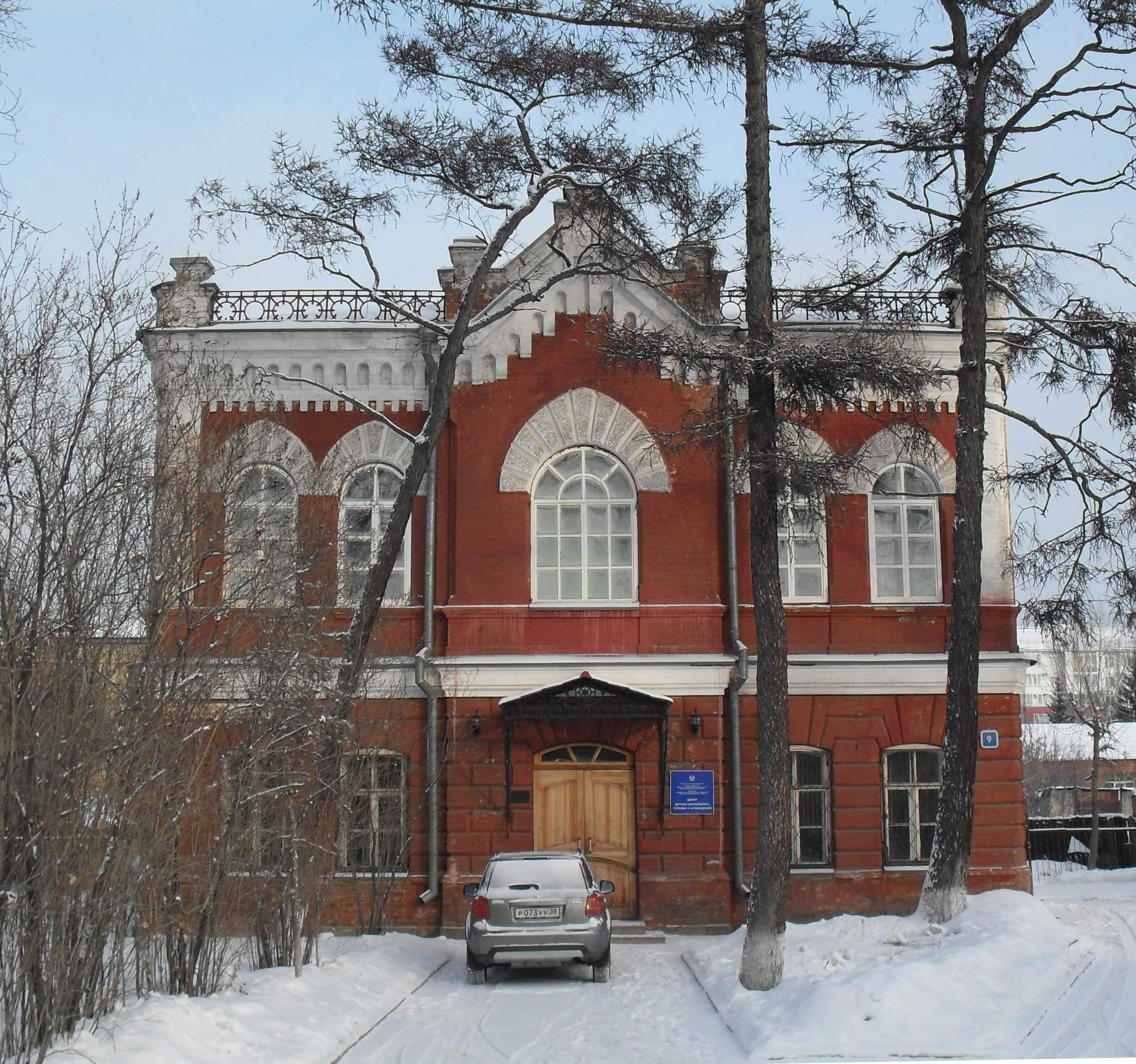 Иркутск. ул. Красноказачья. д. 9. Центр юношеского туризма и краеведения. Здание Успенского училища. Архитектор В. А. Рассушин. 1889 год.